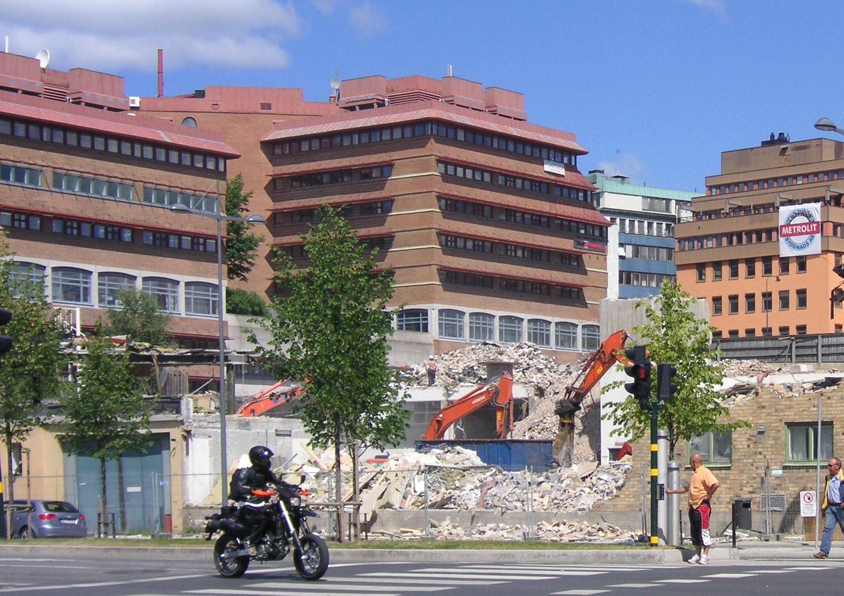 Byggnaden i Lustgården 14 innan rivningen började, Kungsholmen